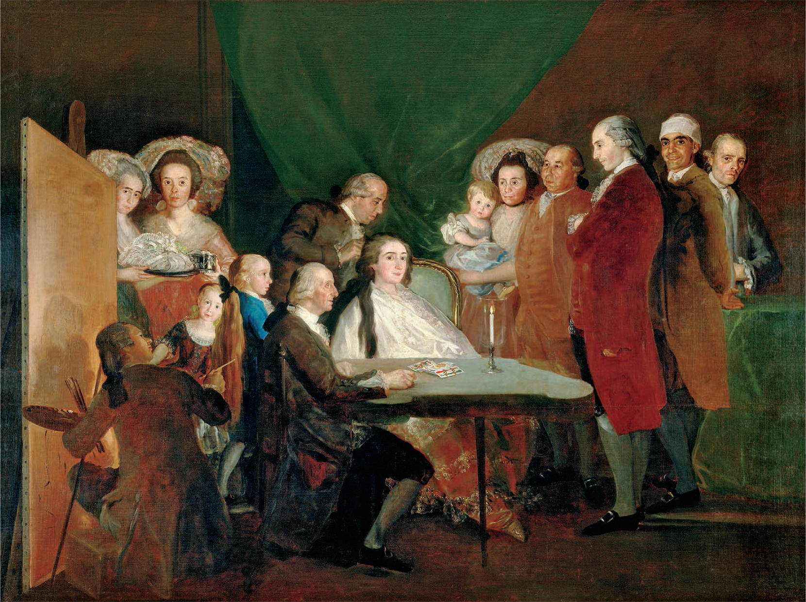 Familie des Luis de Borbón y Farnesio (1727–1785), jüngster Bruder des Königs Karl III., der seit 1776 mit der 34 Jahre jüngeren María Teresa de Vallabriga (Mitte) in einer Morganatischen Ehe verheiratet war. Das Ehepaar hatte drei nicht thronerberechtigte Töchter, die sich nicht der Hauptstadt Madrid nähern durften. Im Vordergrund links malte sich Francisco de Goya mit seiner Rückenansicht in das Portrait.